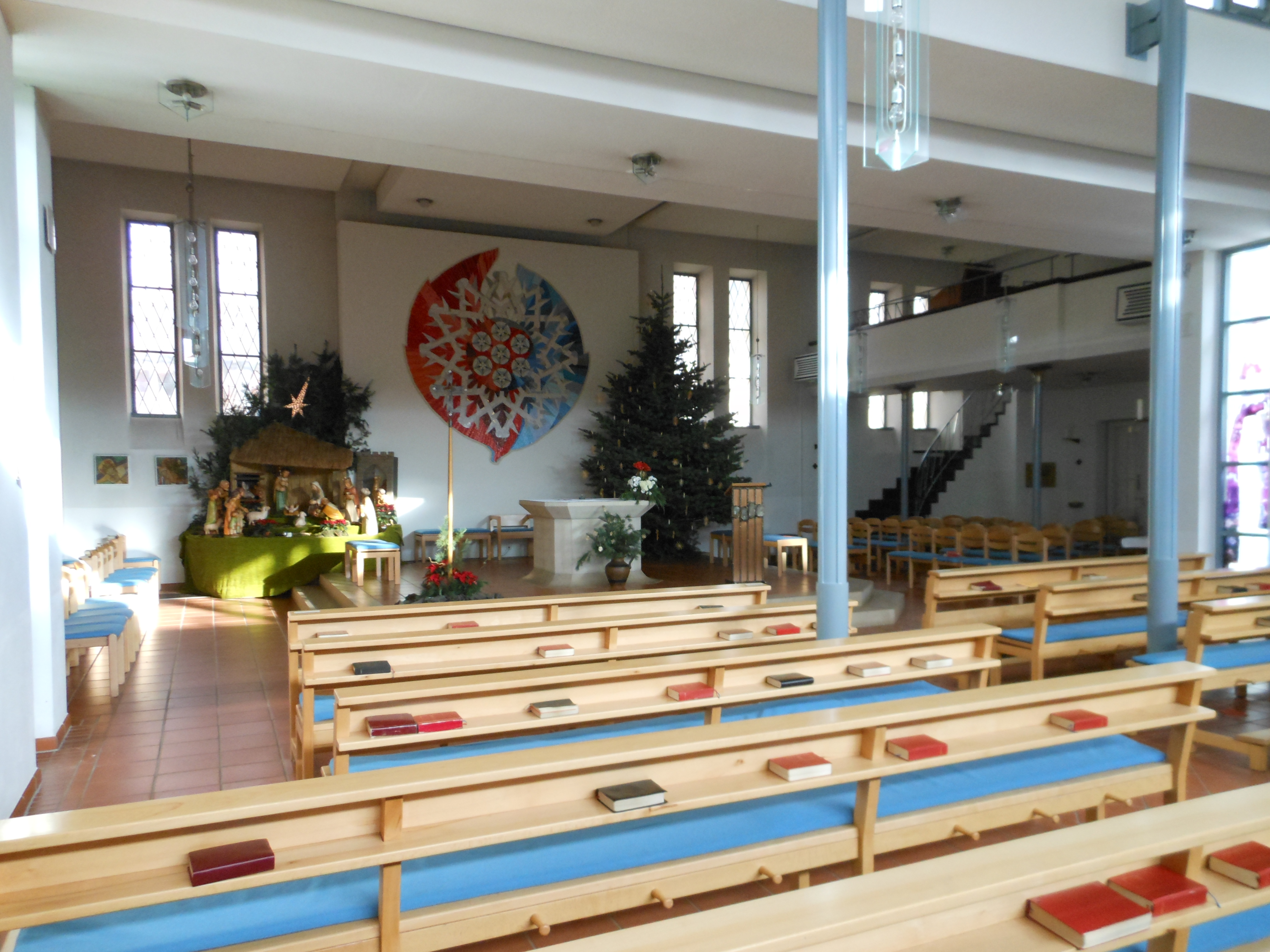 Bad Nenndorf, katholische Kirche Maria vom hl. Rosenkranz, Inneres